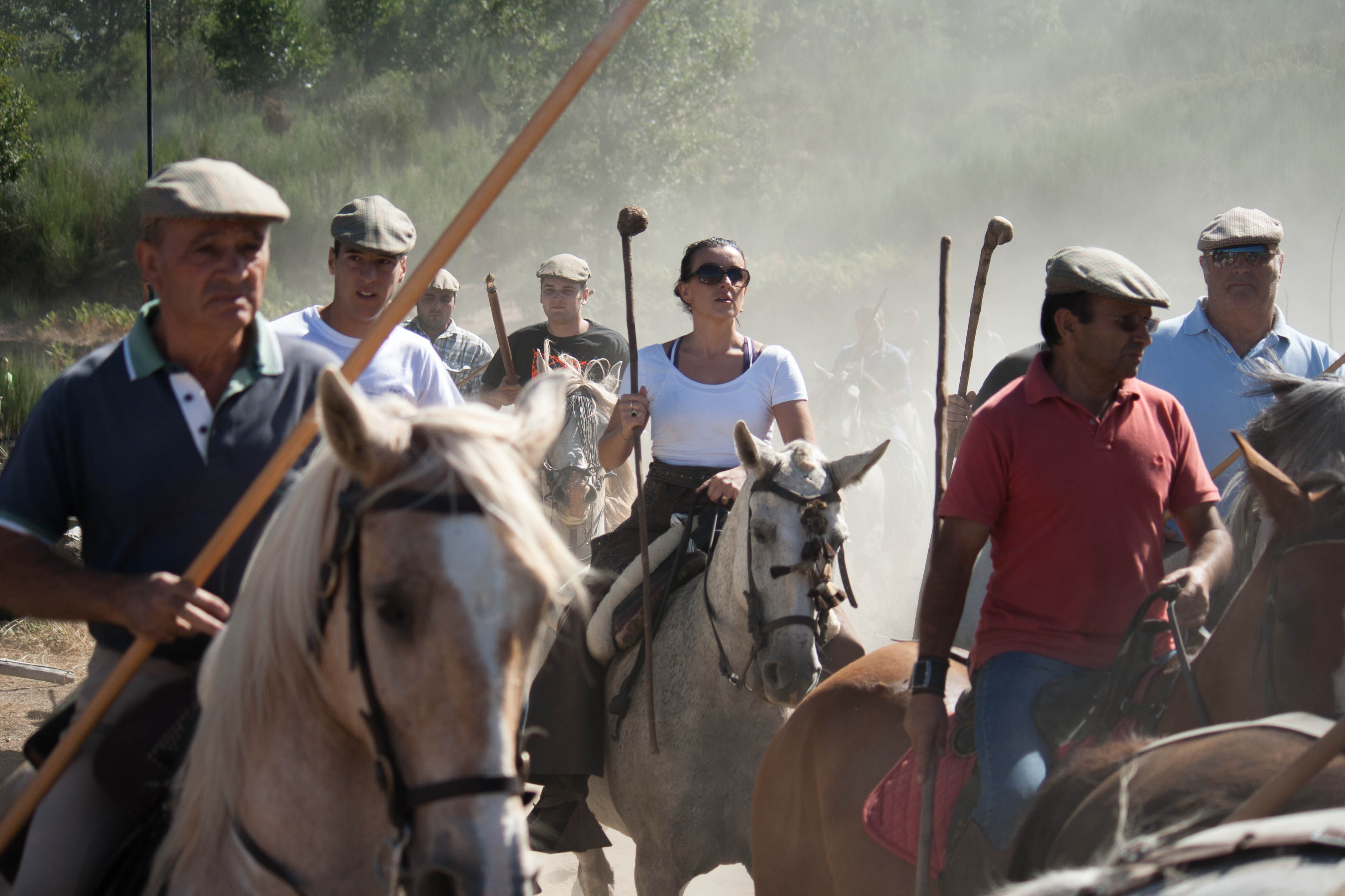 Aldeia Velha, Sabugal Capeia 2012